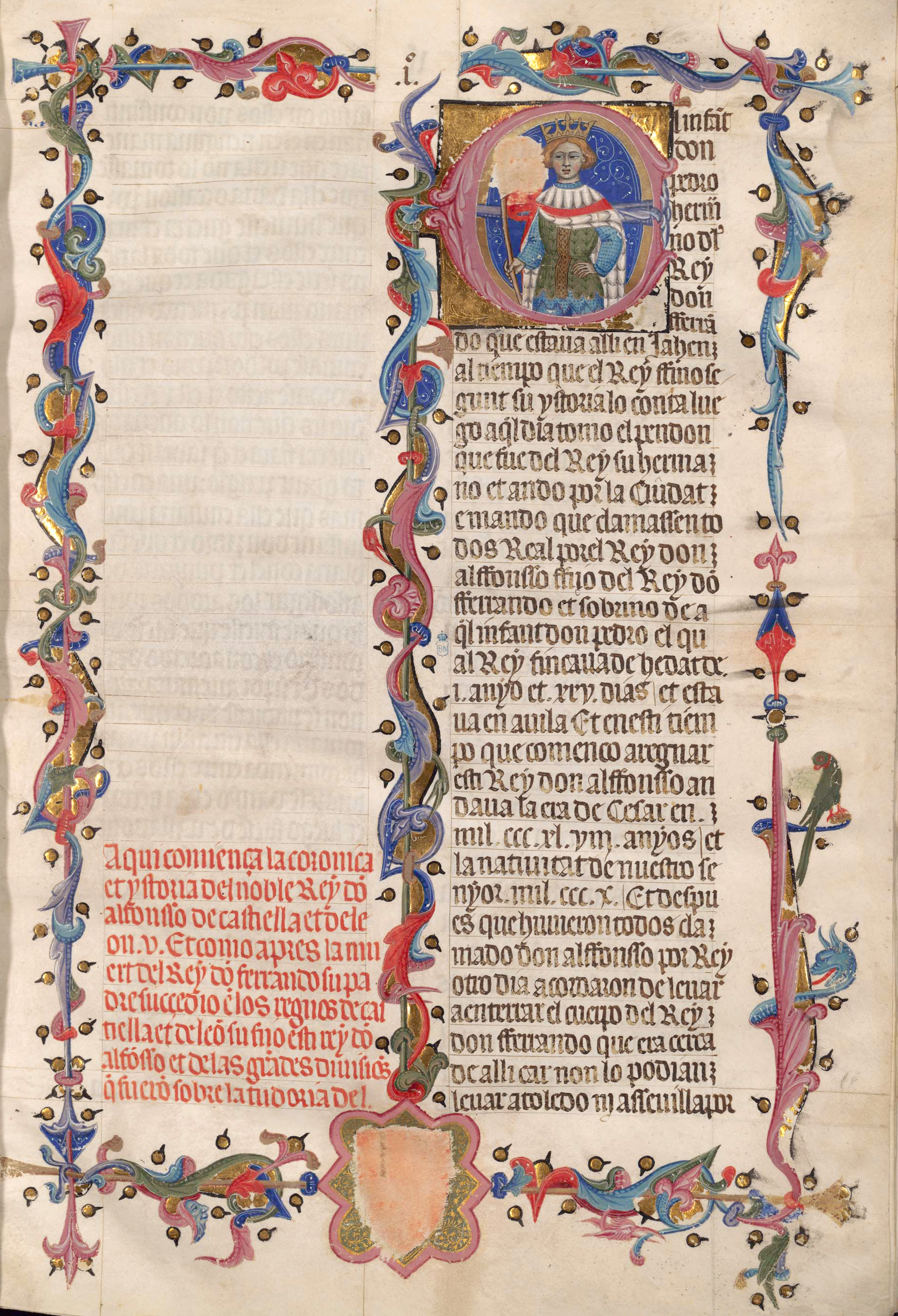 Íncipit de la Grant Crónica de Espanya. Tercera partida de Juan Fernández de Heredia, s. XIV. Texto en aragonés: "Aqui comiença la coronica et ystoria del noble rey don Alfonsso de Castiella e de Leon. Et como apres la muert del rey don Fernando, su padre, suçcedio en los regnos de Castiella et de Leon su, fijo, esti rey don Alfonso et de las grandes divisiones que fueron sobre la tudoria del. El infant don Pedro hermano del rey don Fferrando [...]"